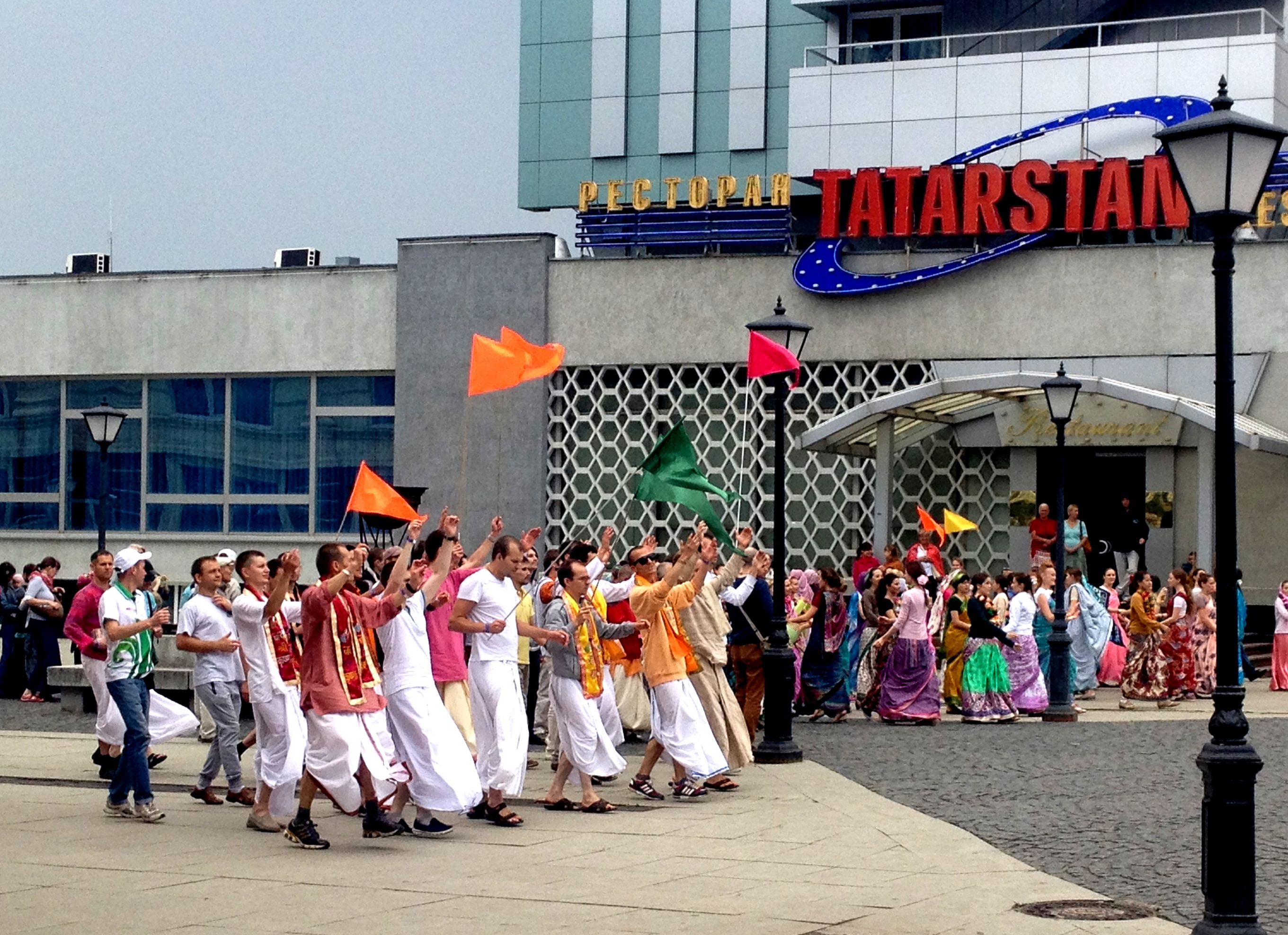 Акция Казанского общества сознания Кришны на Петербургской улице в Казани (2014 год).